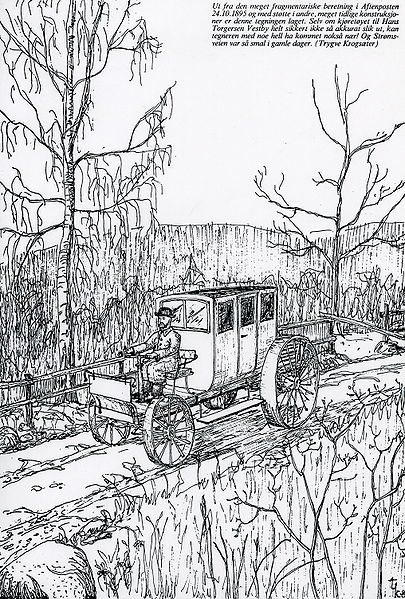 Den fyrste bilen til Hans Torgersen Vestby frå Vestby i Strømmen i Noreg. Her har teiknaren Trygve Krogsæter skildra køyreturen frå Strømmen til Kristiania slik han var omtala i Aftenposten den 24. oktober 1895.